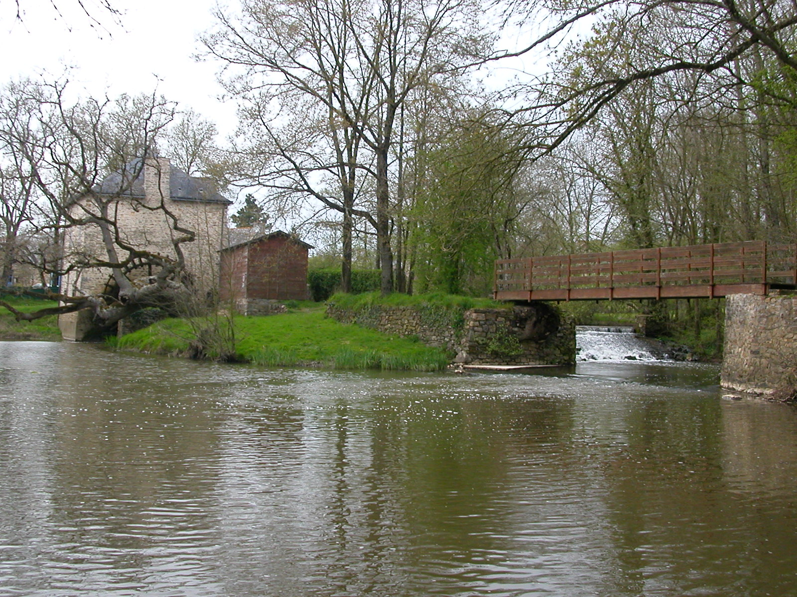 Moulin à eau et plan d'eau de Mouais